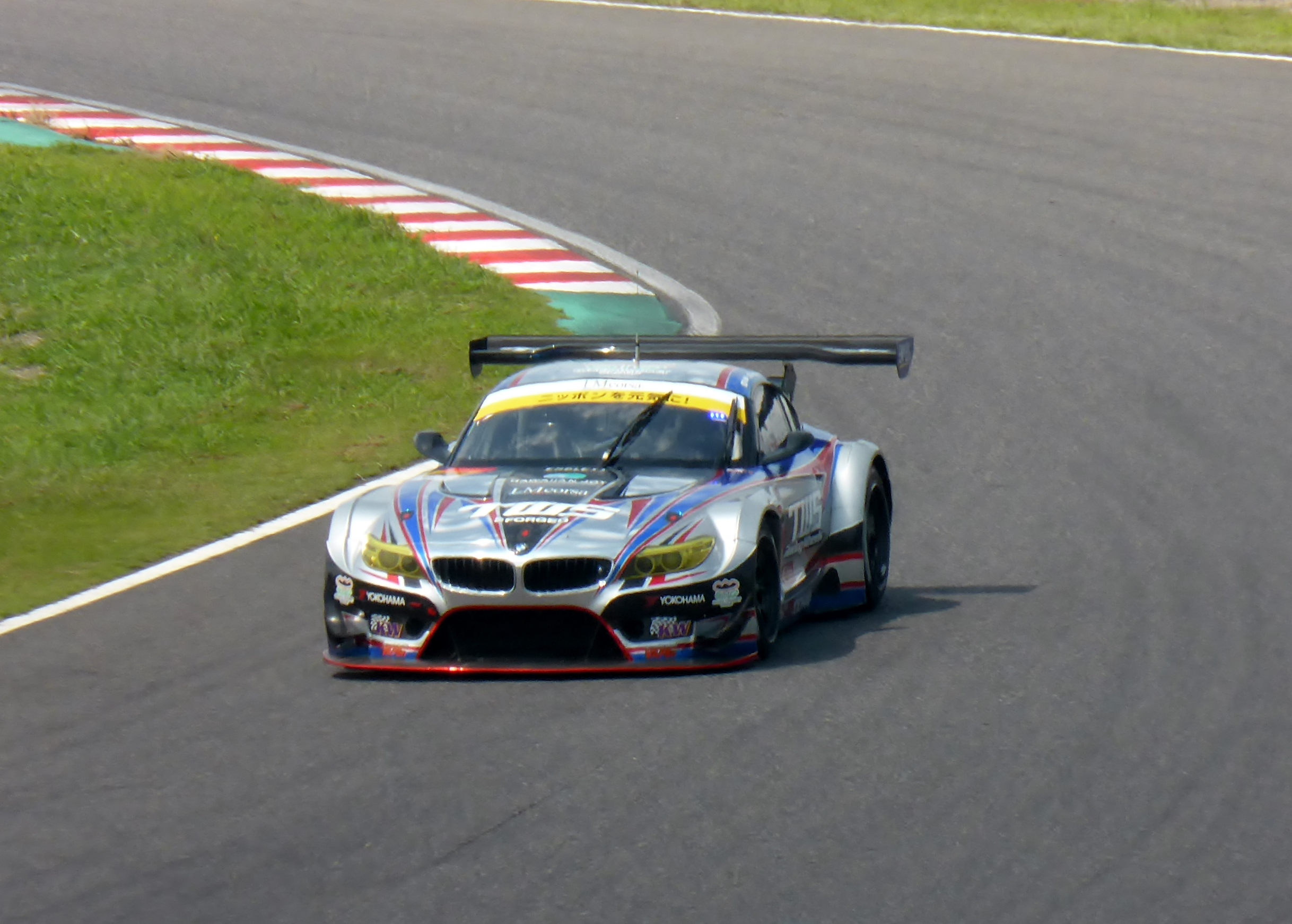 2014年度ポッカサッポロ1000kmにおける60号車TWS LM Corsa BMW Z4を撮影。